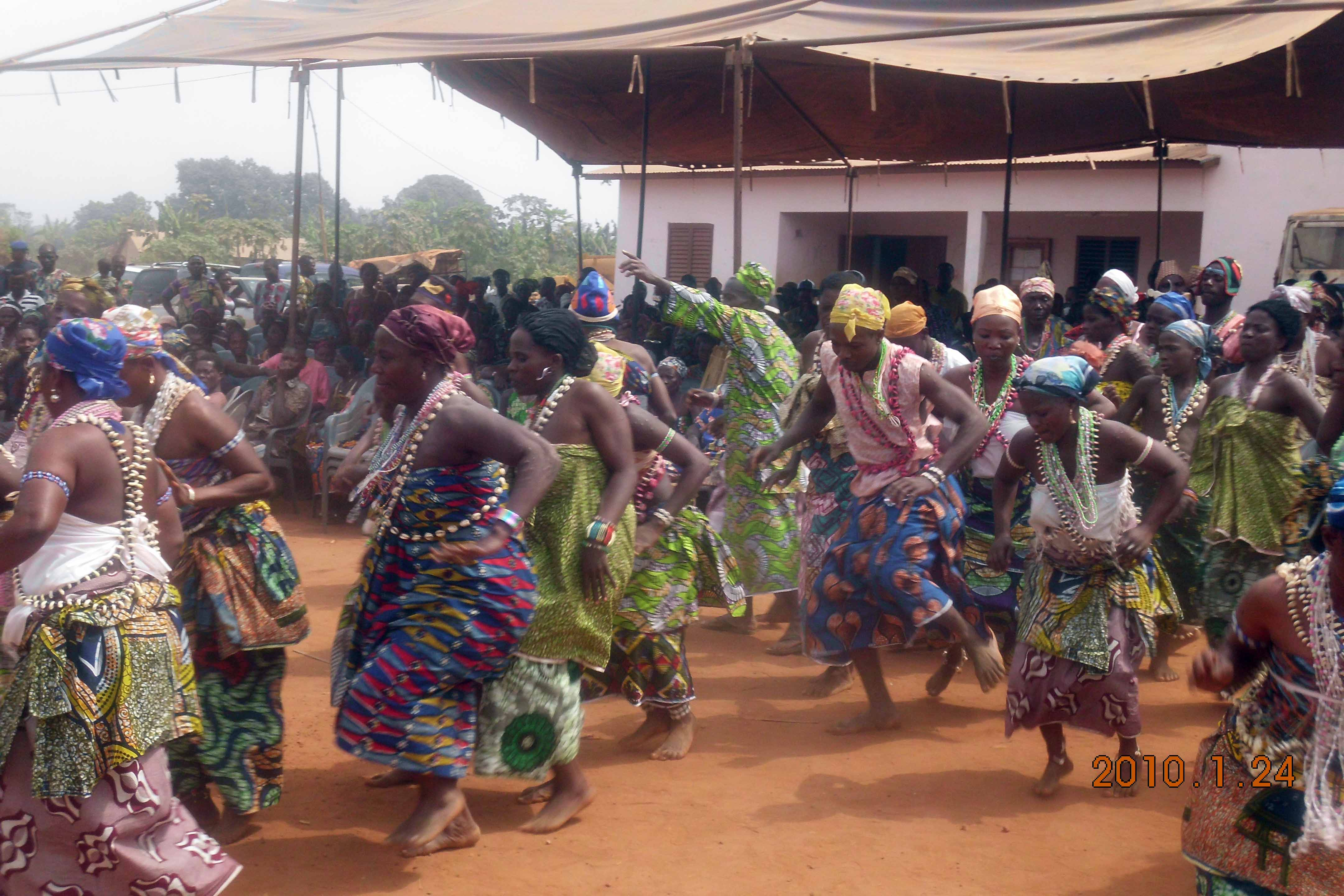 La sortie des adeptes des religions endogènes du Bénin.